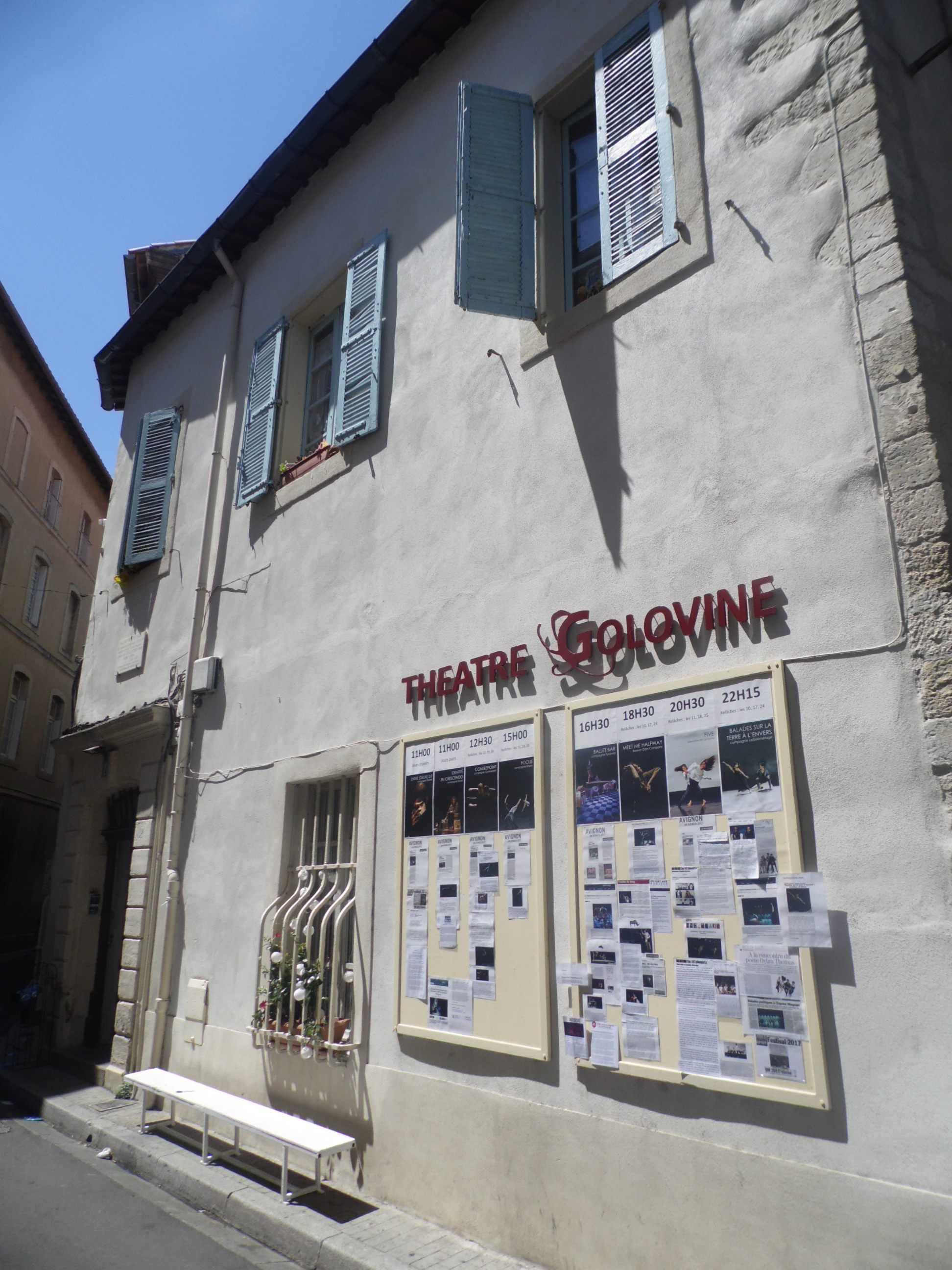 Théâtre Golovine, OFF DANSE 2017